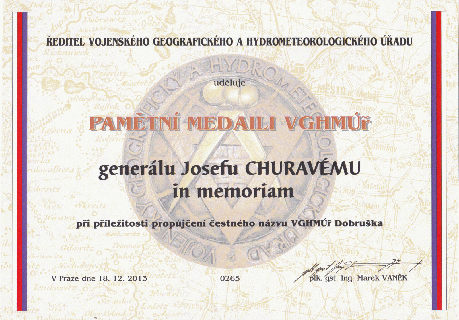 Doprovodná listina. Ředitel Vojenského geografického a hydrometeorologického úřadu plukovník generálního štábu Ing. Marek Vaněk udělil (in memoriam) dne 18. prosince 2013 generálu Josefu Churavému pamětní medaili VGHMÚř u příležitosti propůjčení čestného názvu.